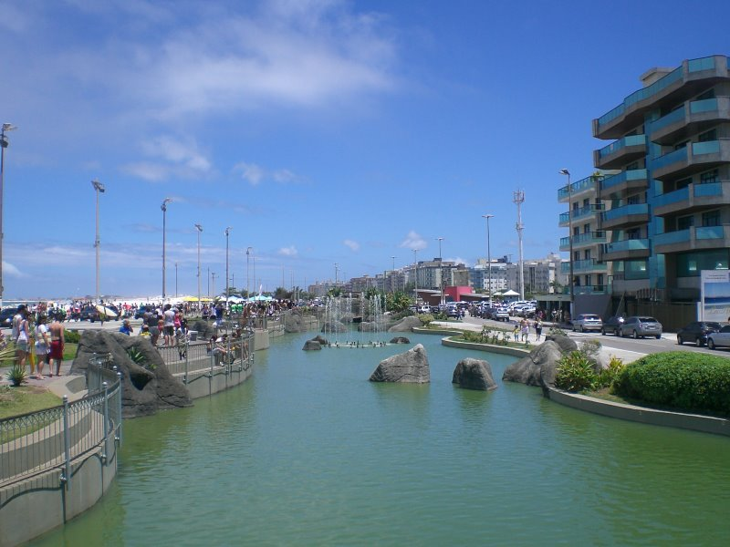 Cabo Frio, RJ: conjunto paisagístico